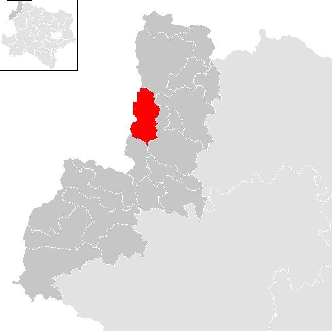 Bezirk Gmünd